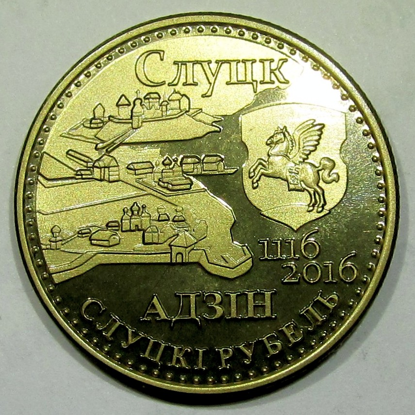 Второй релиз проекта "113 городов" Беларусь - АДЗIН СЛУЦКI РУБЕЛЬ. Отчеканен к 900-летию первого исторического упоминания г. Слуцк. Аверс монеты: - Название и современный герб г.Слуцк (он же - герб княжеского рода Олельковичей). - Фрагмент старого города (Реплика рисунка Игоря Титковского. Используется с разрешения автора.) - Номинал монеты - "АДЗIН СЛУЦКI РУБЕЛЬ". - Даты - 1116 и 2016. Реверс монеты: - Схематическая карта Республики Беларусь с границами областей. - Один из символов Беларуси - аист. - Год чеканки монеты - "2016". - Надпись на белорусском языке "РЭСПУБЛIКА БЕЛАРУСЬ". Дата выпуска: Апрель 2016. Размер: 25*2мм. Гурт: рубчатый. Материал: латунь. Вес монеты: ~ 7.9гр. Тираж: 100 экз. Перевыпуск: исключено. Источник